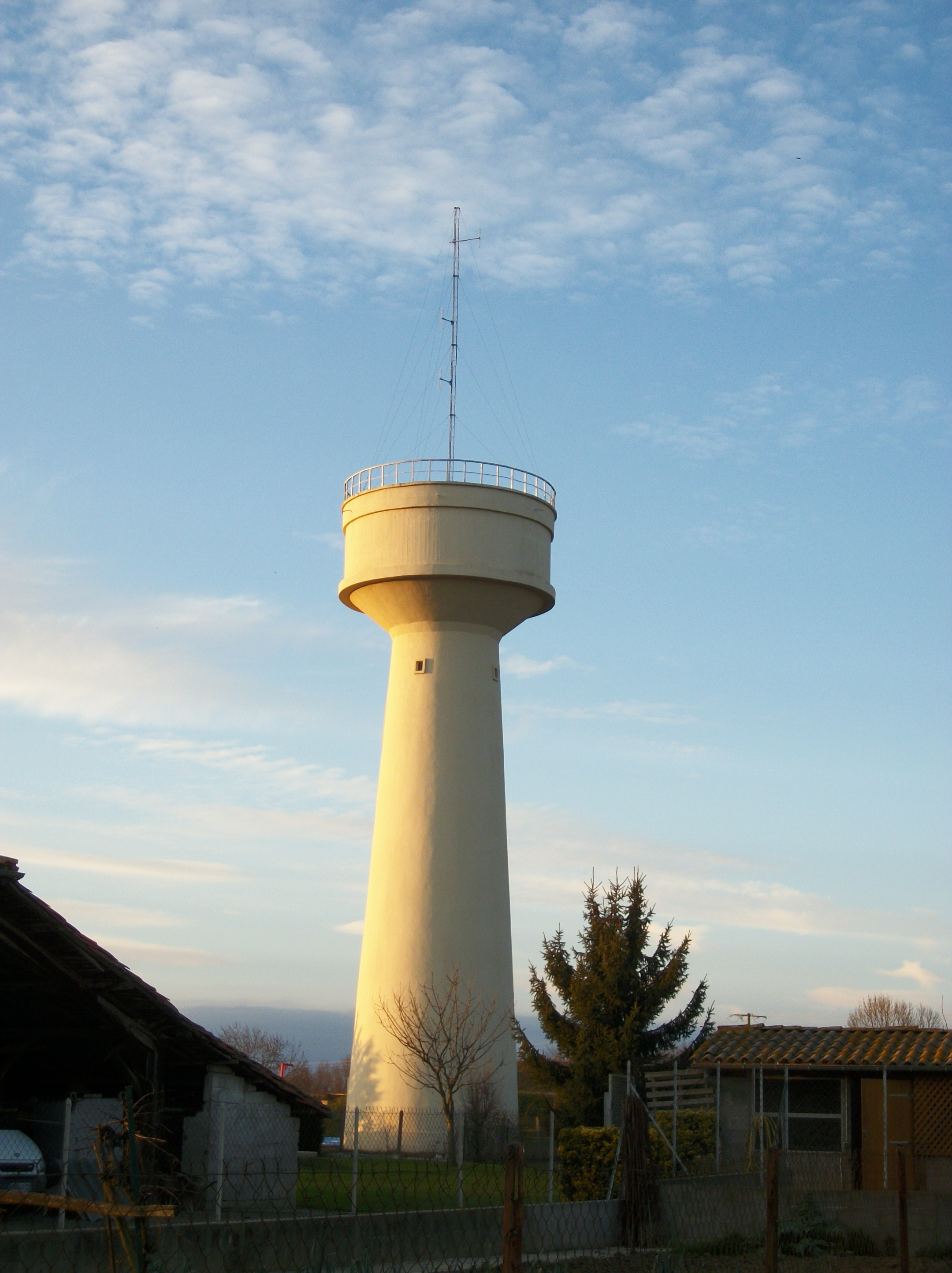 Château d'eau